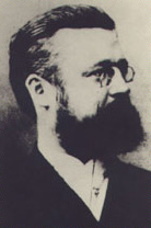 R. Armsted, Logenmeister der Johannisloge "Zum Todtenkopf und Phönix" 1923